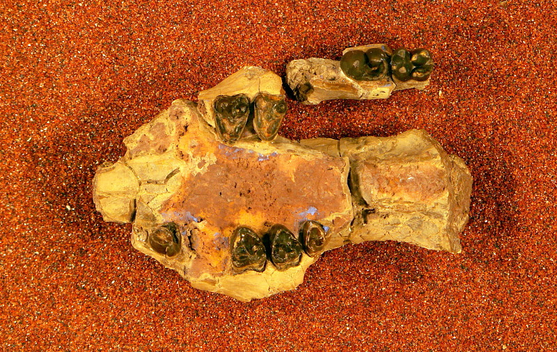 Huerfanodon torrejonius Schock